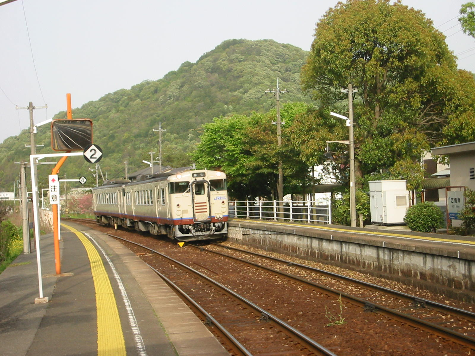 JR吉備線